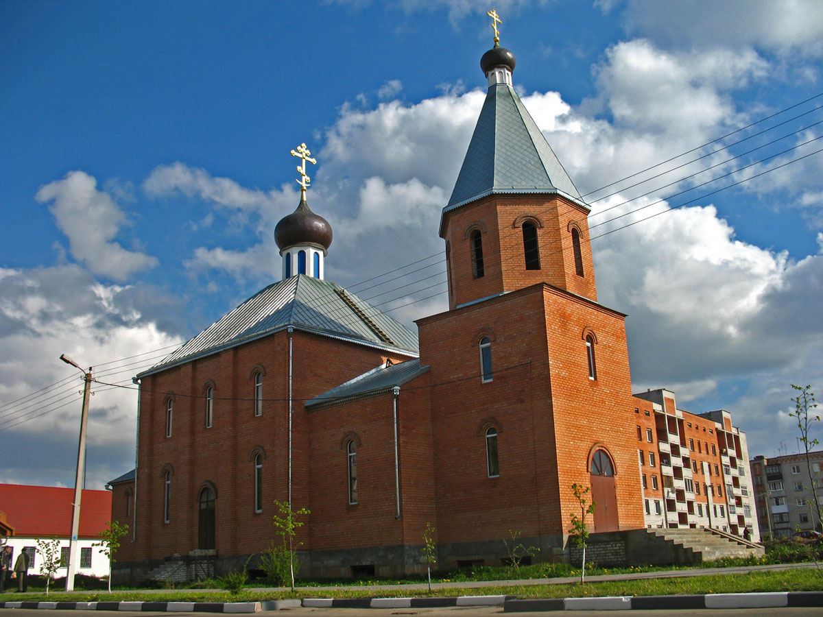 Беларуская (тарашкевіца): Царква ў Смалявічах